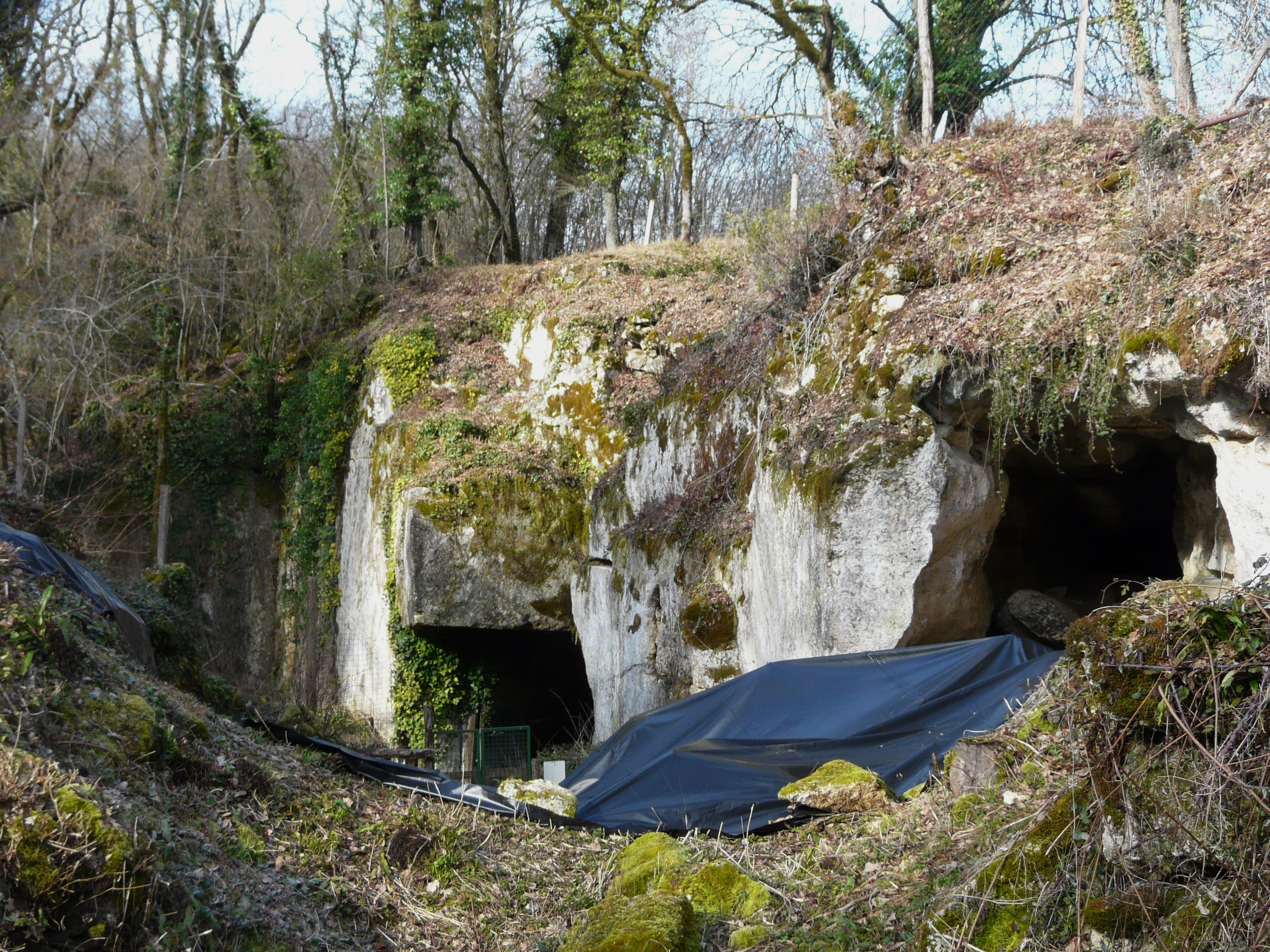 La grotte de Jovelle, La Tour-Blanche, Dordogne, France. À gauche, une ancienne carrière de calcaire.